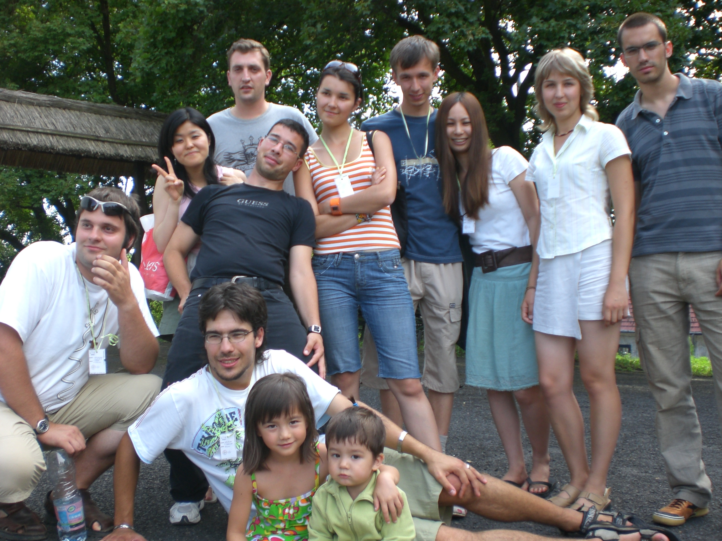 IJK-anoj dum la ekskurso al Balatono.